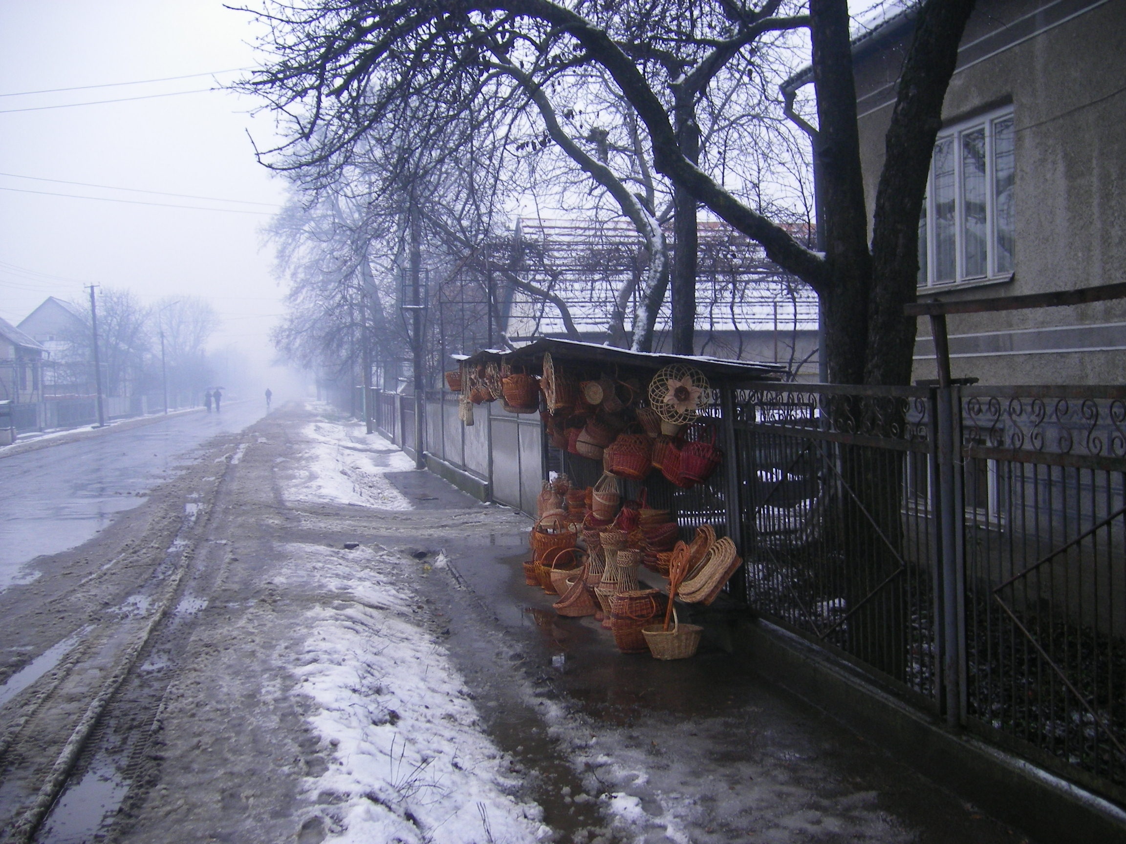 Iza, Khust Raion